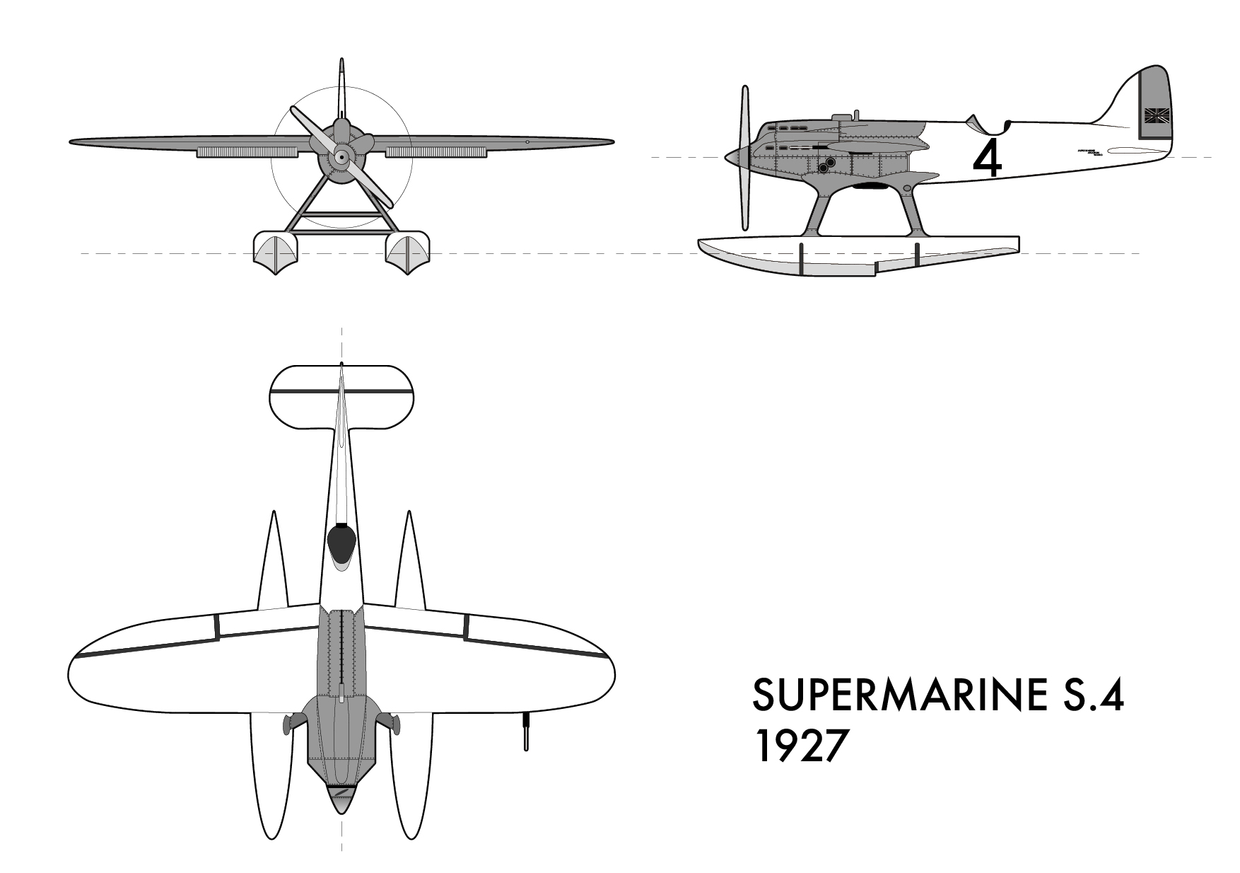 Supermarine S.4 3 vues illustrator